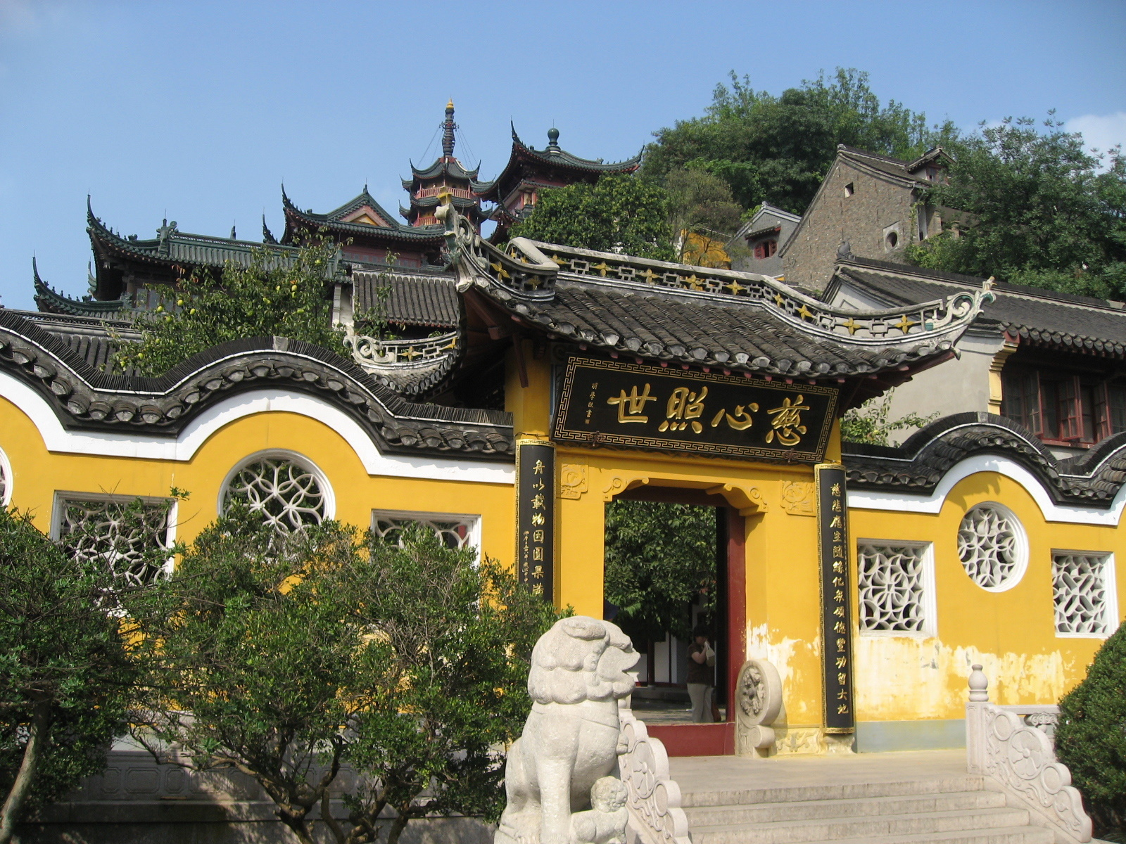 金山寺